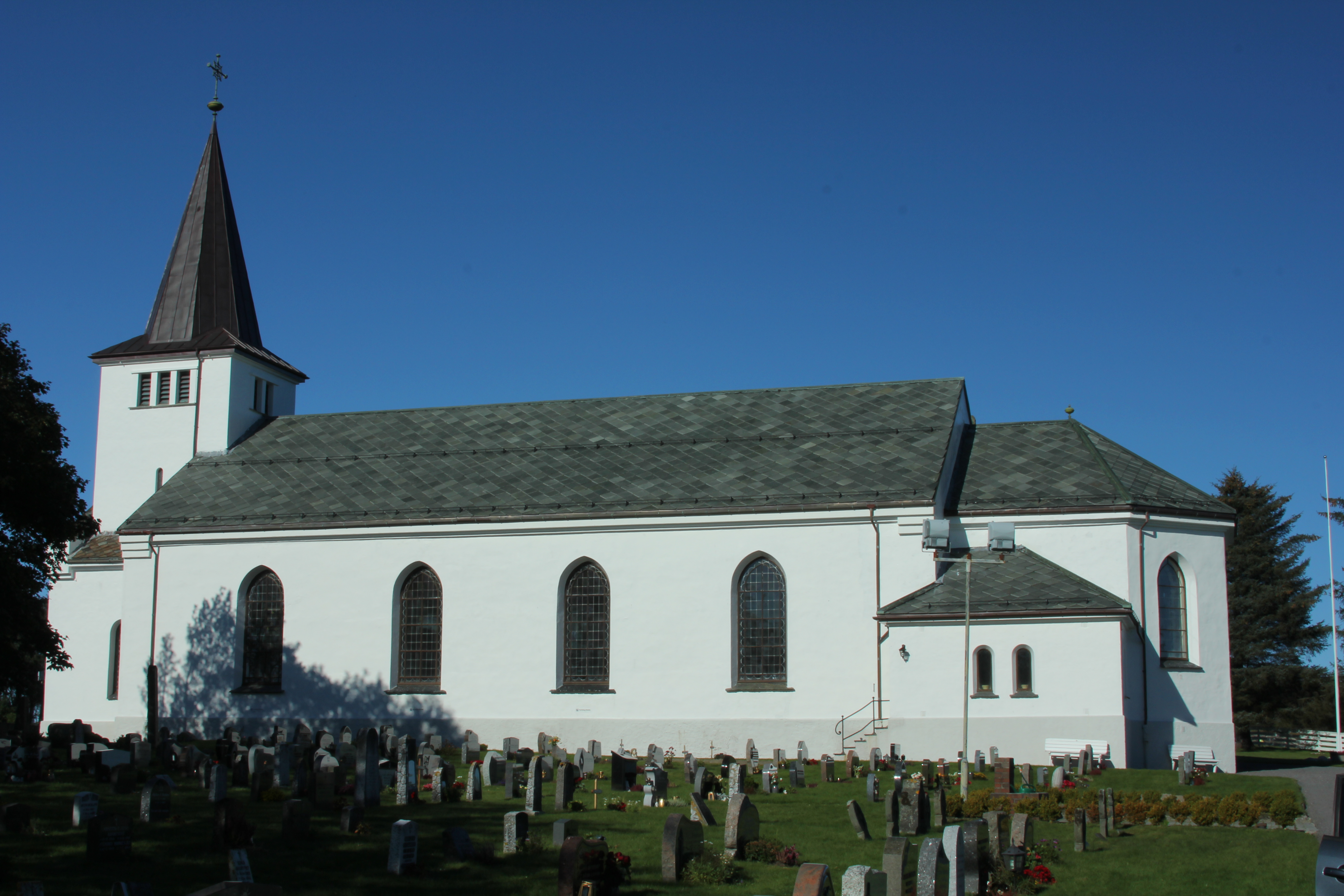 Herdla Church